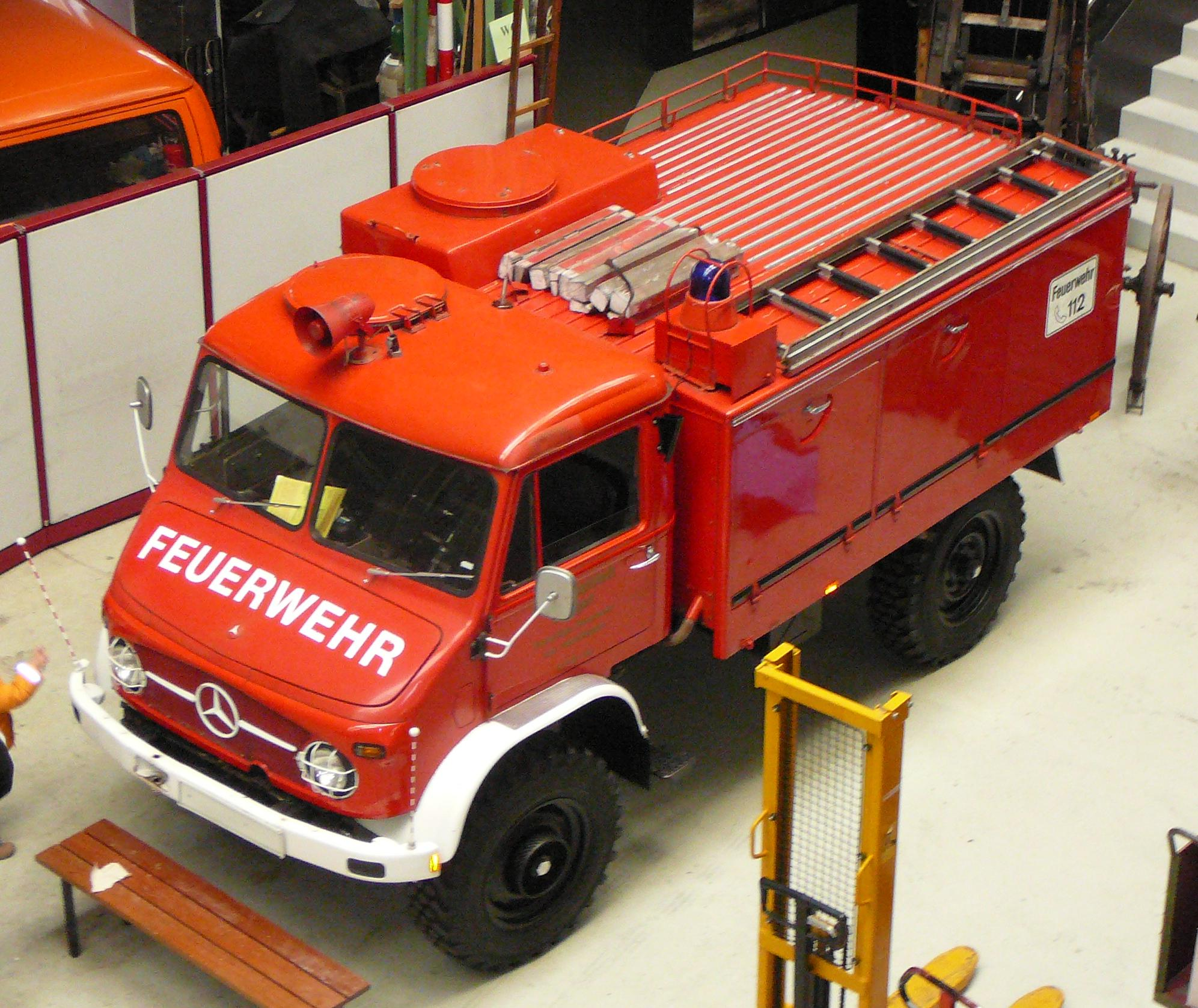 Tanklöschfahrzeug 8-14 auf einem Unimog 404, Bj. 1966, ehemals Feuerwehr Hedelfingen, heute Feuerwehrmuseum Stuttgart.